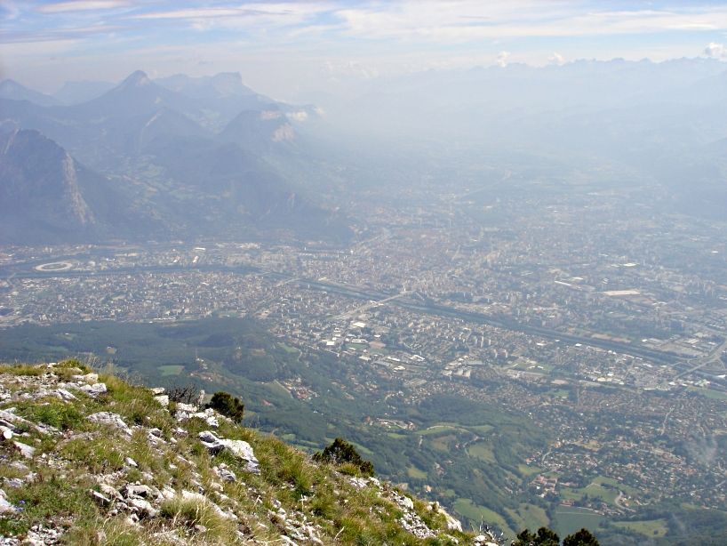 Grenoble vue depuis le Moucherotte (1900m)